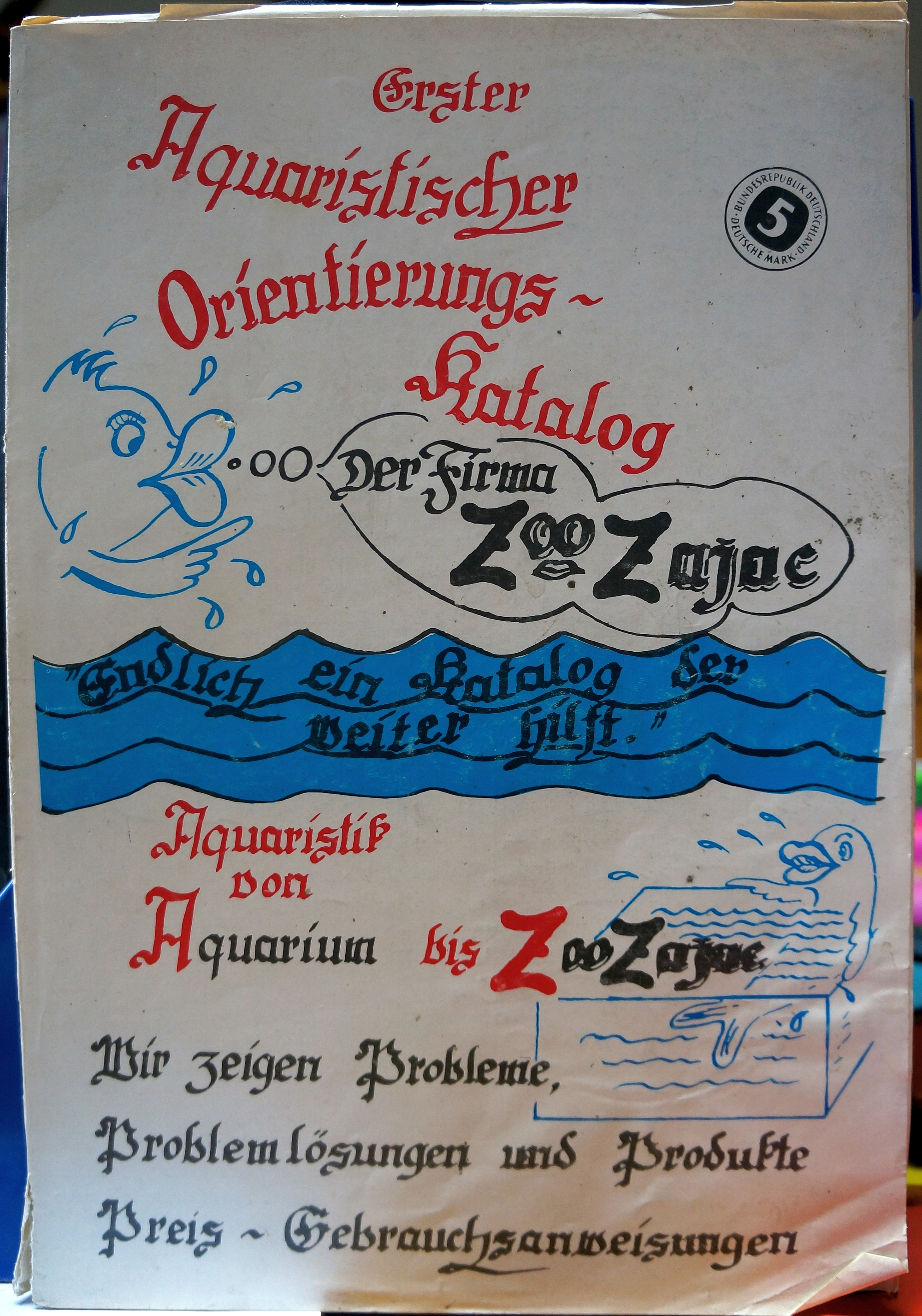 Erster Aquaristischer Orientierungskatalog der Firma Zoo Zajac, Duisburg